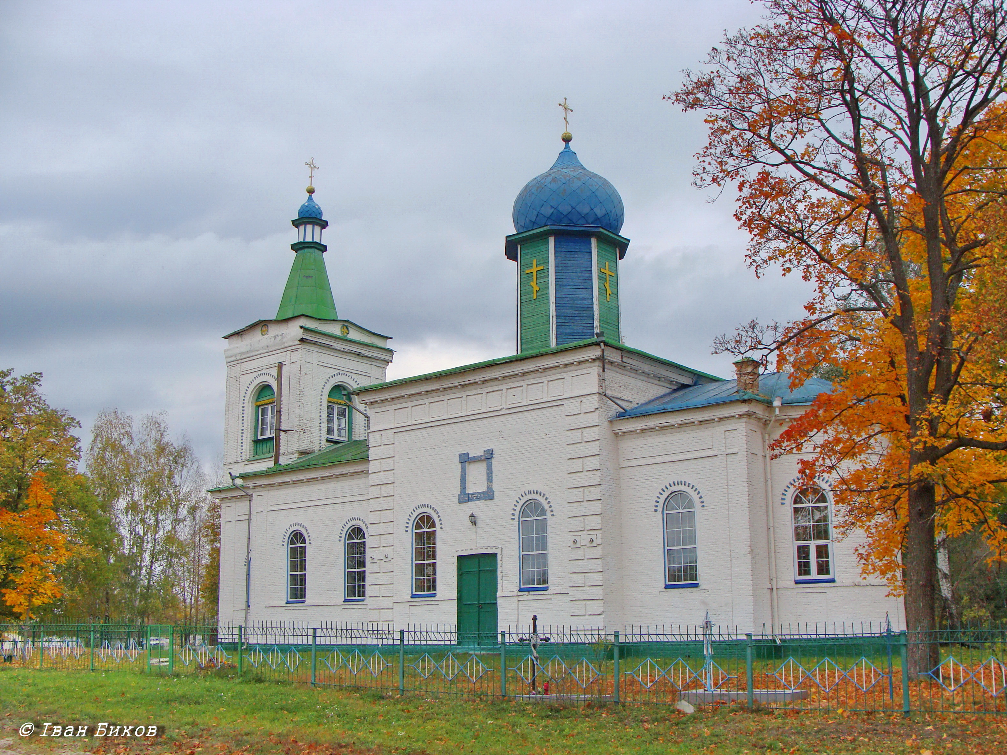 Церква Воздвиженська, Любимівка